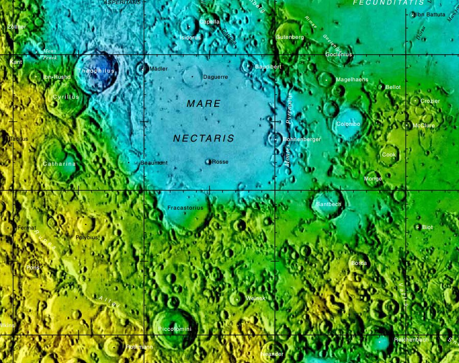 Cráter lunar Fracastorius. Localización. (Imagen LRO)